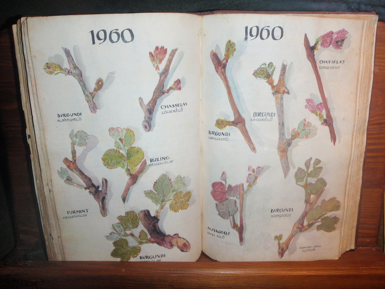 Kőszeg, "Buch der Redlinge", seit 1742